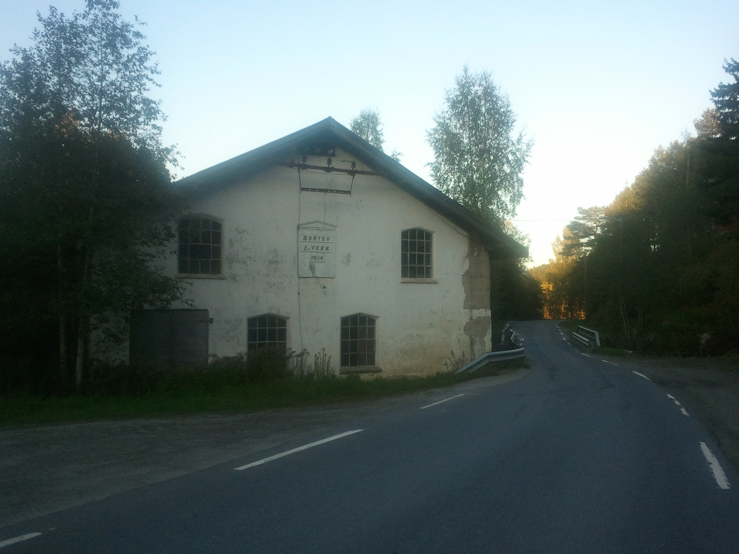 Børter everk i 2014, etter 100 års kontinuerlig drift.